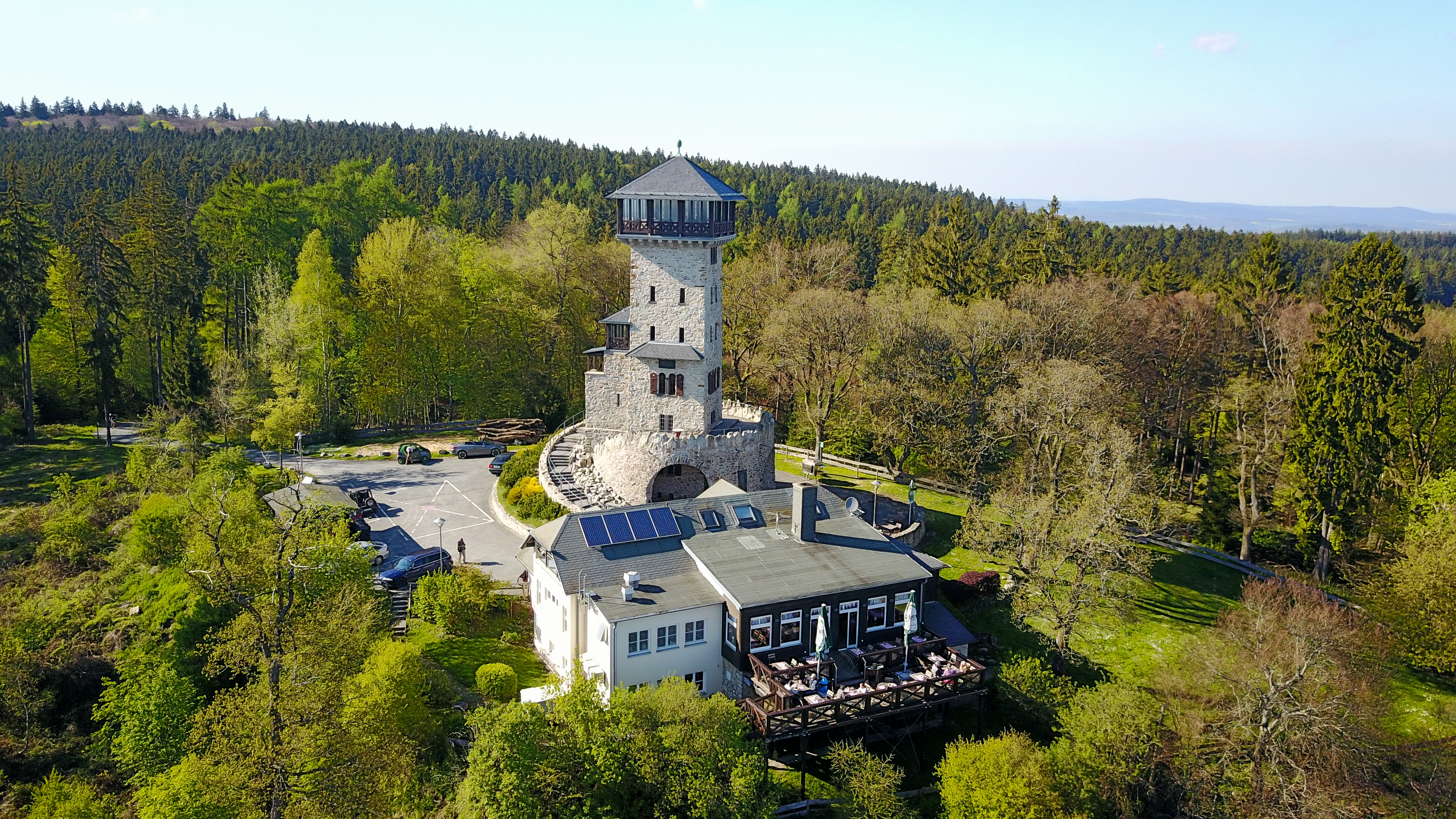 Luftbild vom Gipfel des Herzbergs bei Bad Homburg, mit Restaurant und Aussichtsturm.